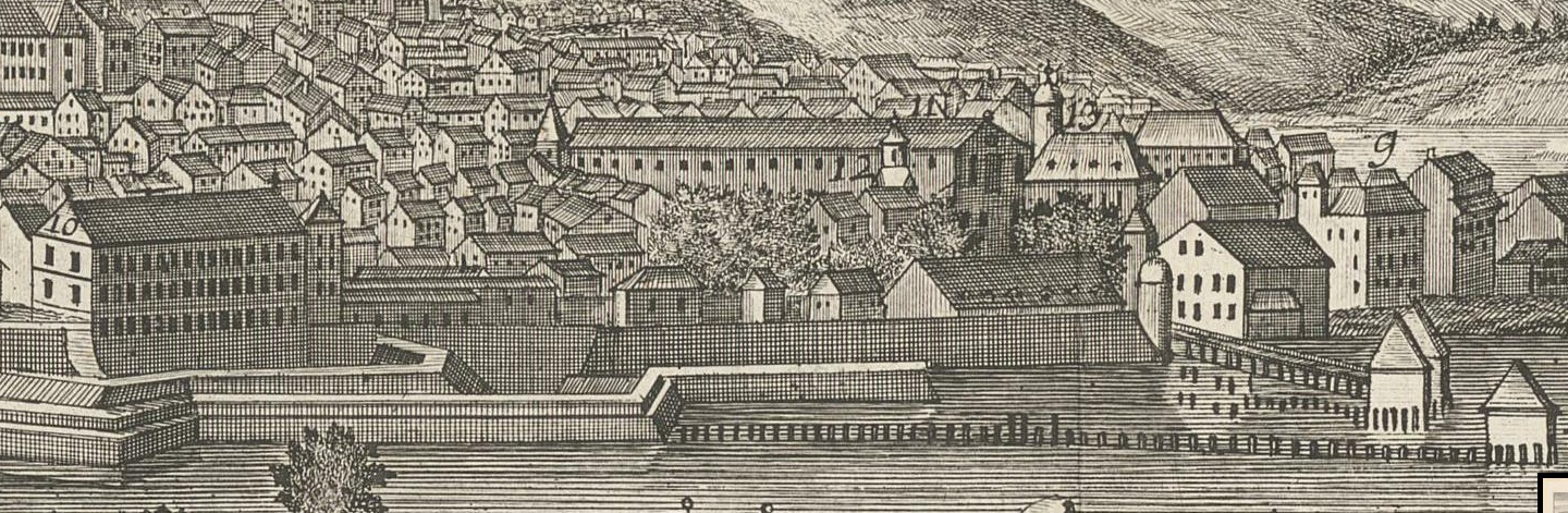 Vue de la ville de Genève. "Veue de la ville de Geneve du coté du Septentrion / Robertus Gardelle pinxit ; Antonius Chopy delineavit ; J.G. Seiller Schaffusian sculps.". Détail : la Basse-Ville. Grand bâtiment au centre : les halles du Molard. Grand bâtiment sur la gauche : les boucheries de Longemalle.